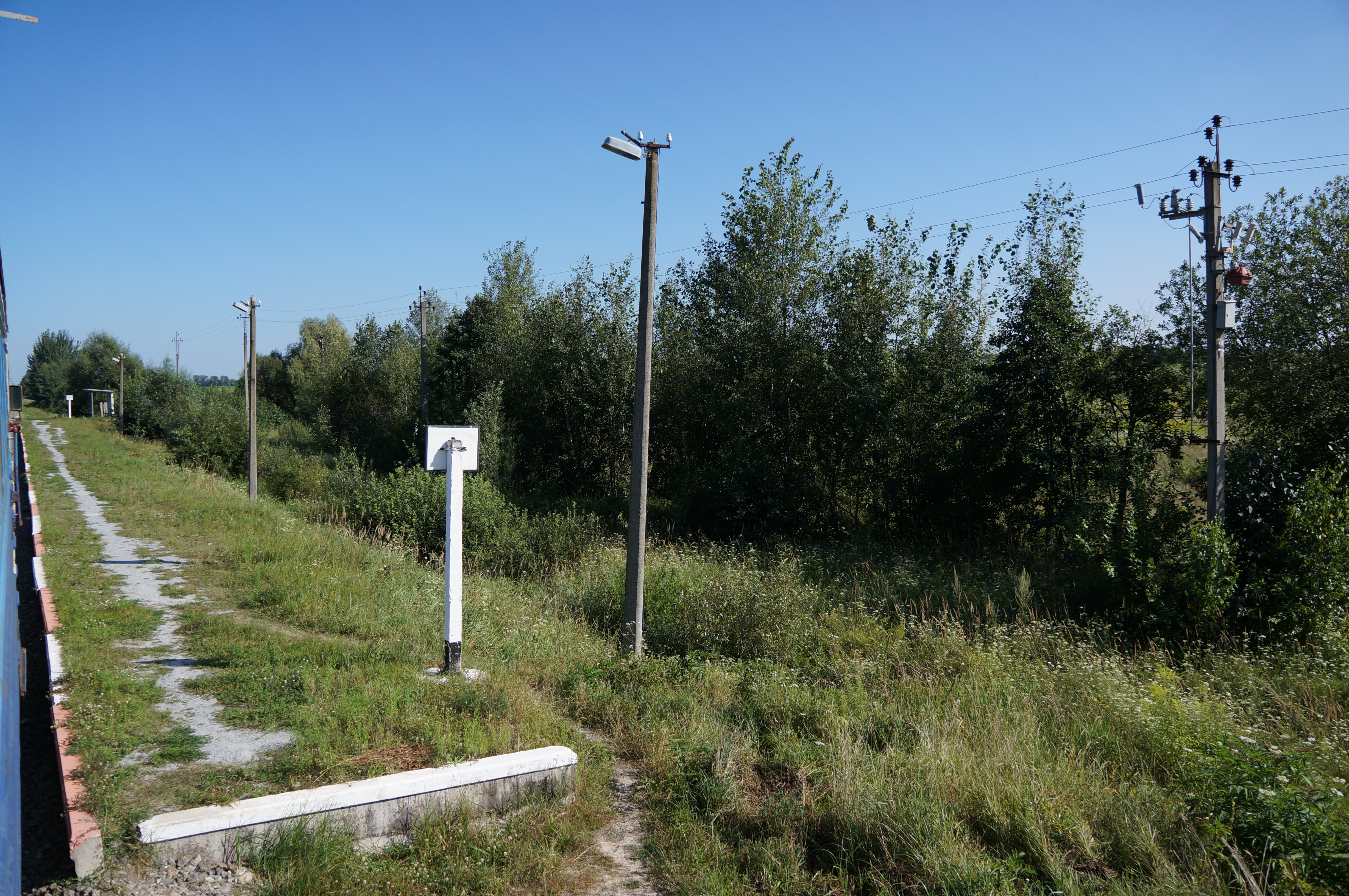 Залізнична платформа Ліщин